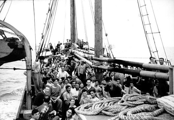 על סיפון אניית המעפילים לניצחון